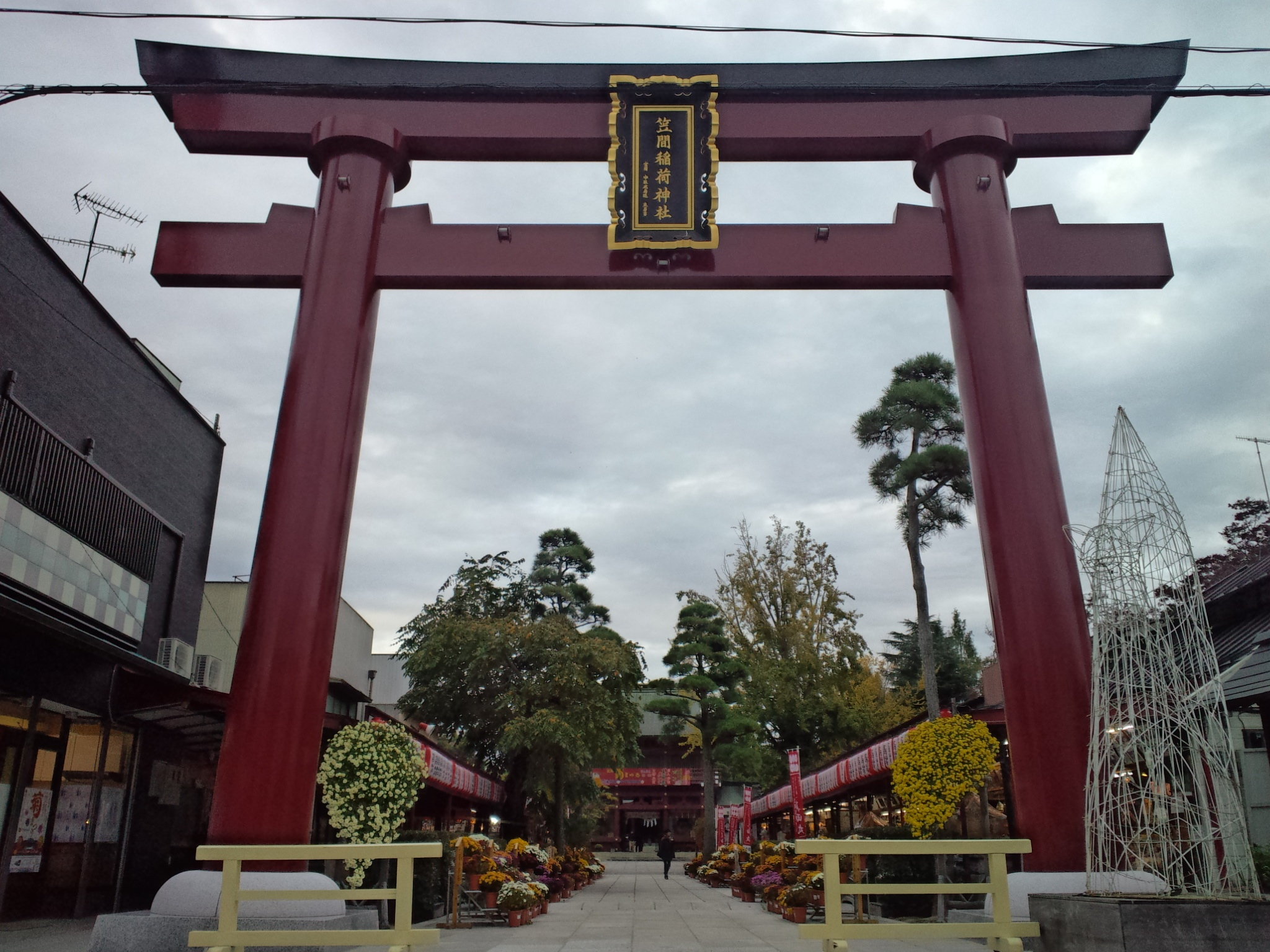 茨城県笠間市「笠間稲荷神社」大鳥居